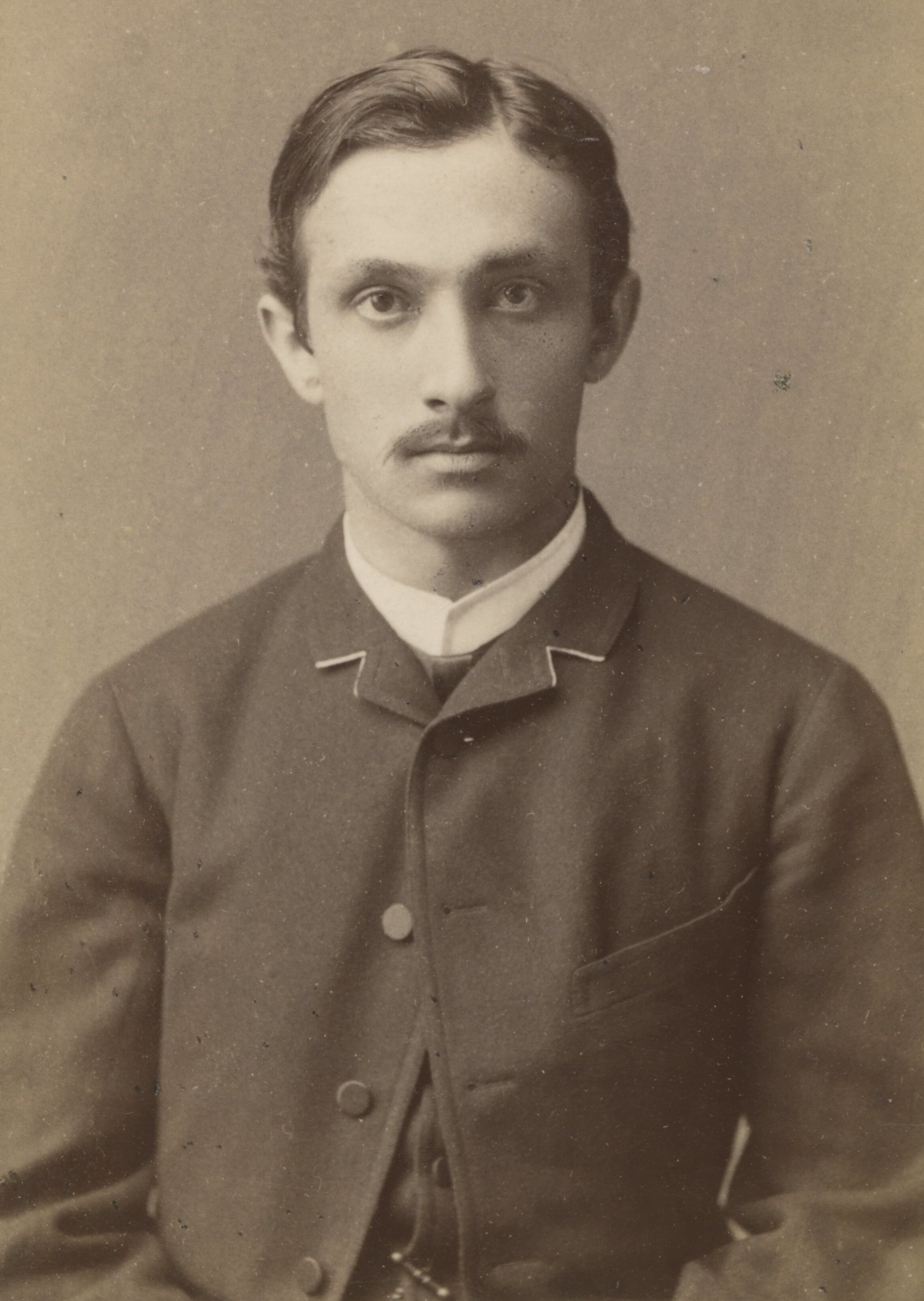 Kazimierz Kaden